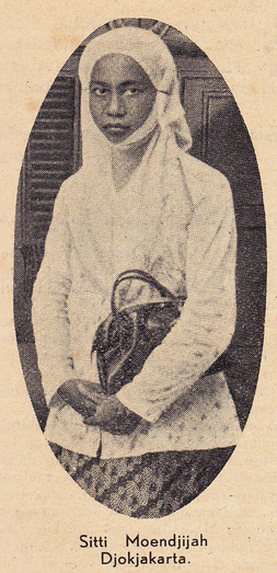 Siti Munjiyah adalah salah satu tokoh Aisyiyah yang lahir di Kampung Kauman, Kelurahan Ngupasan, Kecamatan Gondomanan, Provinsi Daerah Istimewa Yogyakarta pada tahun 1896. Dia meninggal pada tahun 1955 dan dimakamkan di Permakaman Kauman yang berada di belakang Masjid Gedhe Kauman.